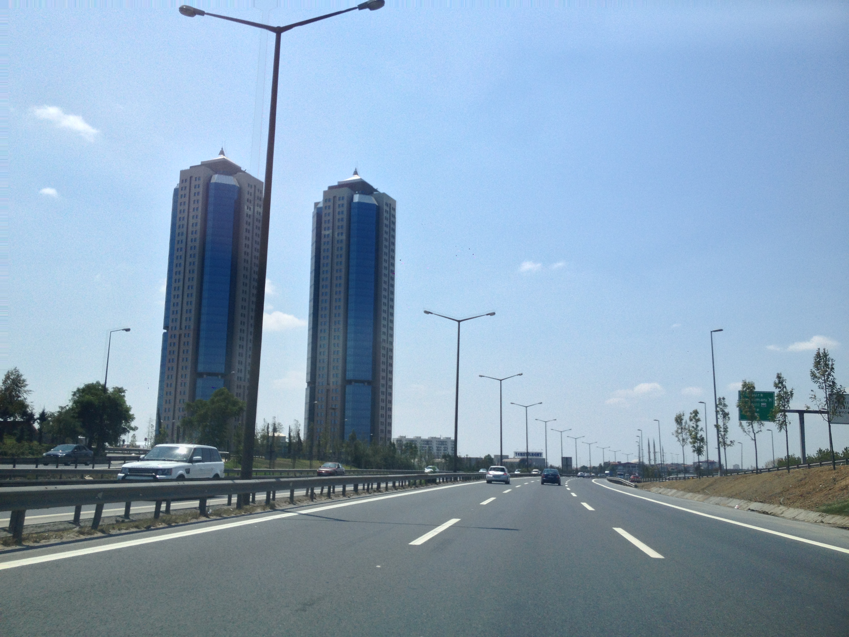 Esenler/İstanbul, Turkey